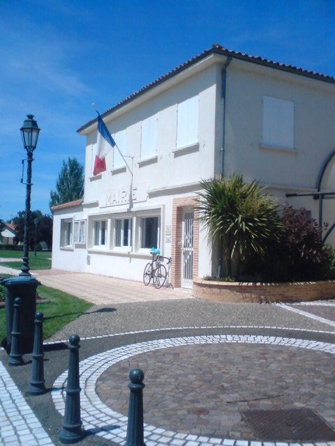 Mairie de Estillac (47)